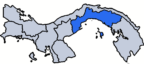 Mappa dell'arcidiocesi cattolica di Panamá, nello stato centramericano di Panama.